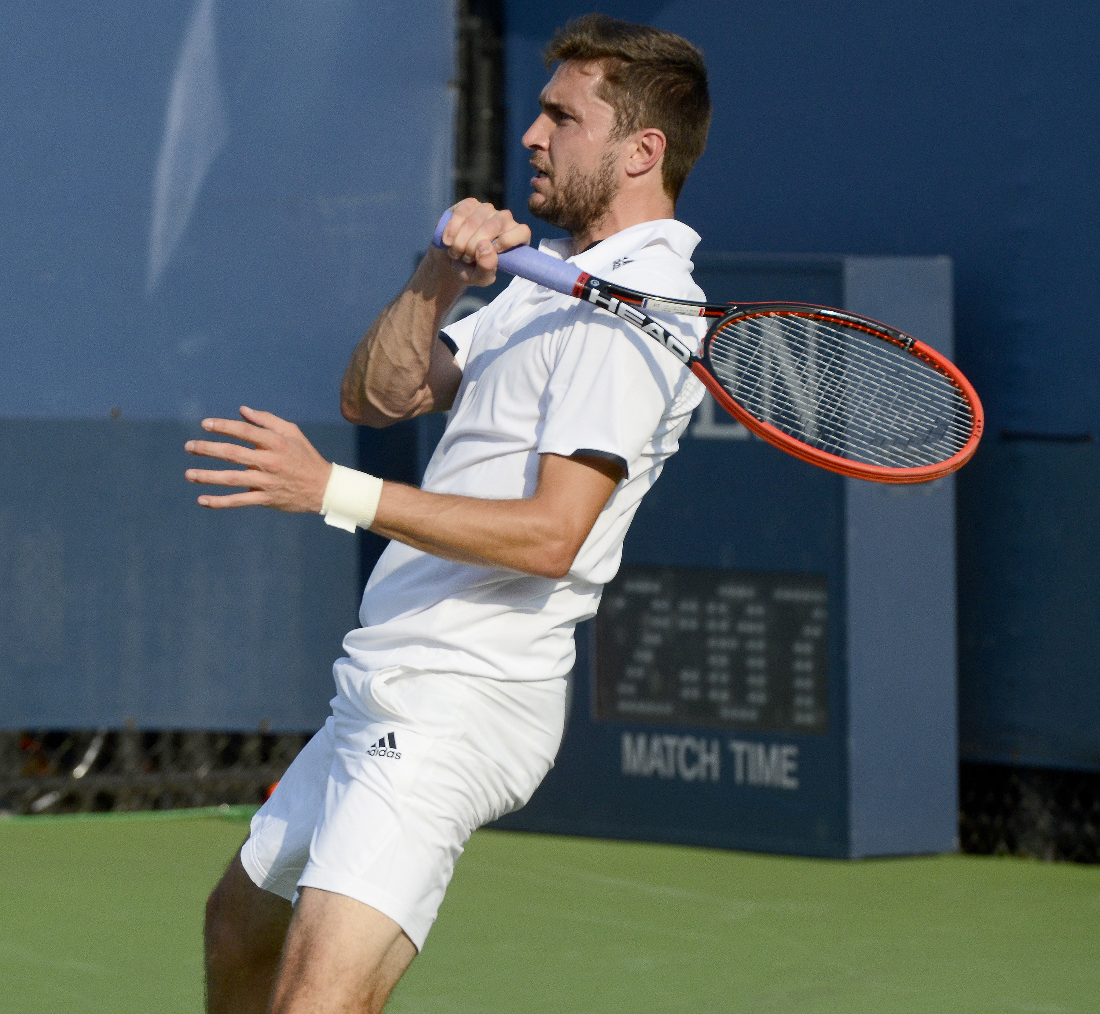 August 26, 2014 Queens, NY Gilles Simon (FRA) def. Radu Albot (MDA)